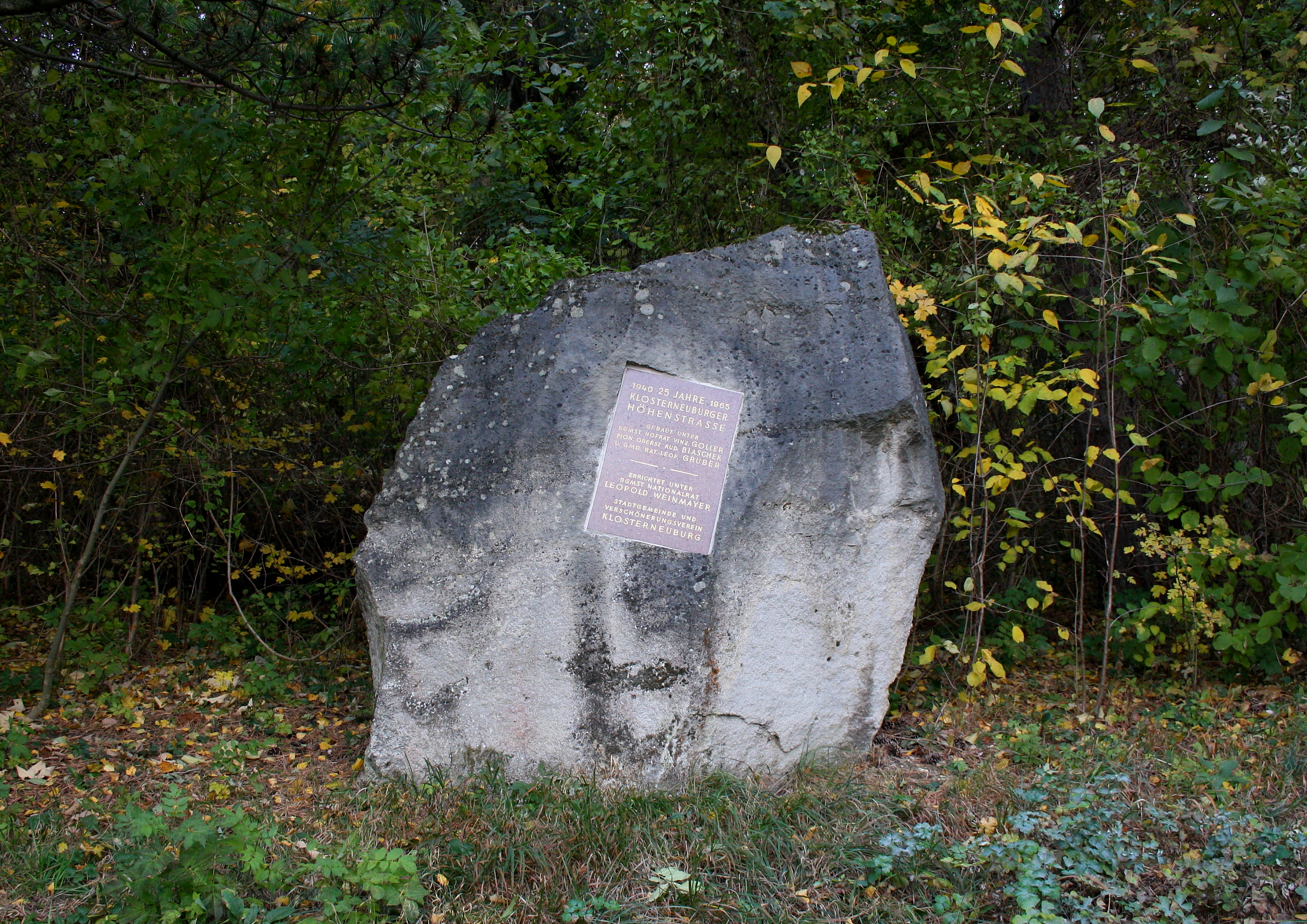 Gedenkstein bezüglich dem Bau der Klosterneuburger Höhenstraße, talseitig vor der ersten "Waldkehre".